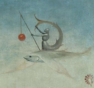 The Garden of Earthly Delights, detail (zeeridder).